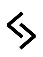 runic letter jeran